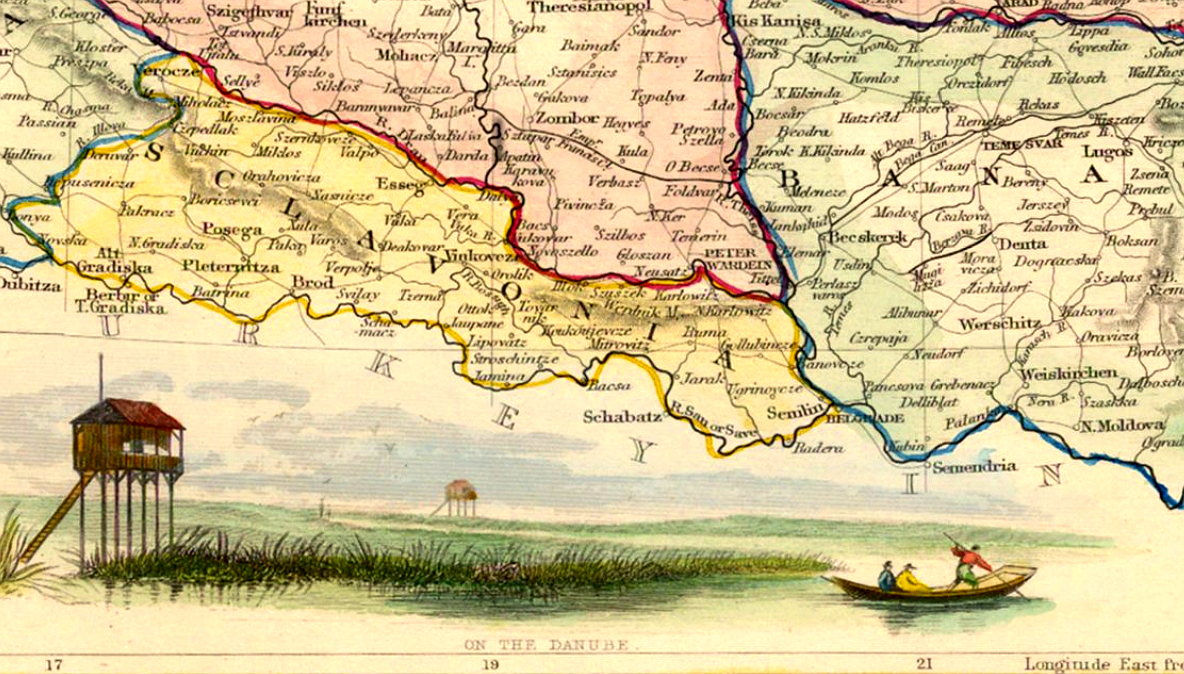 Magyarország és Erdély térképe 1851 kivágás